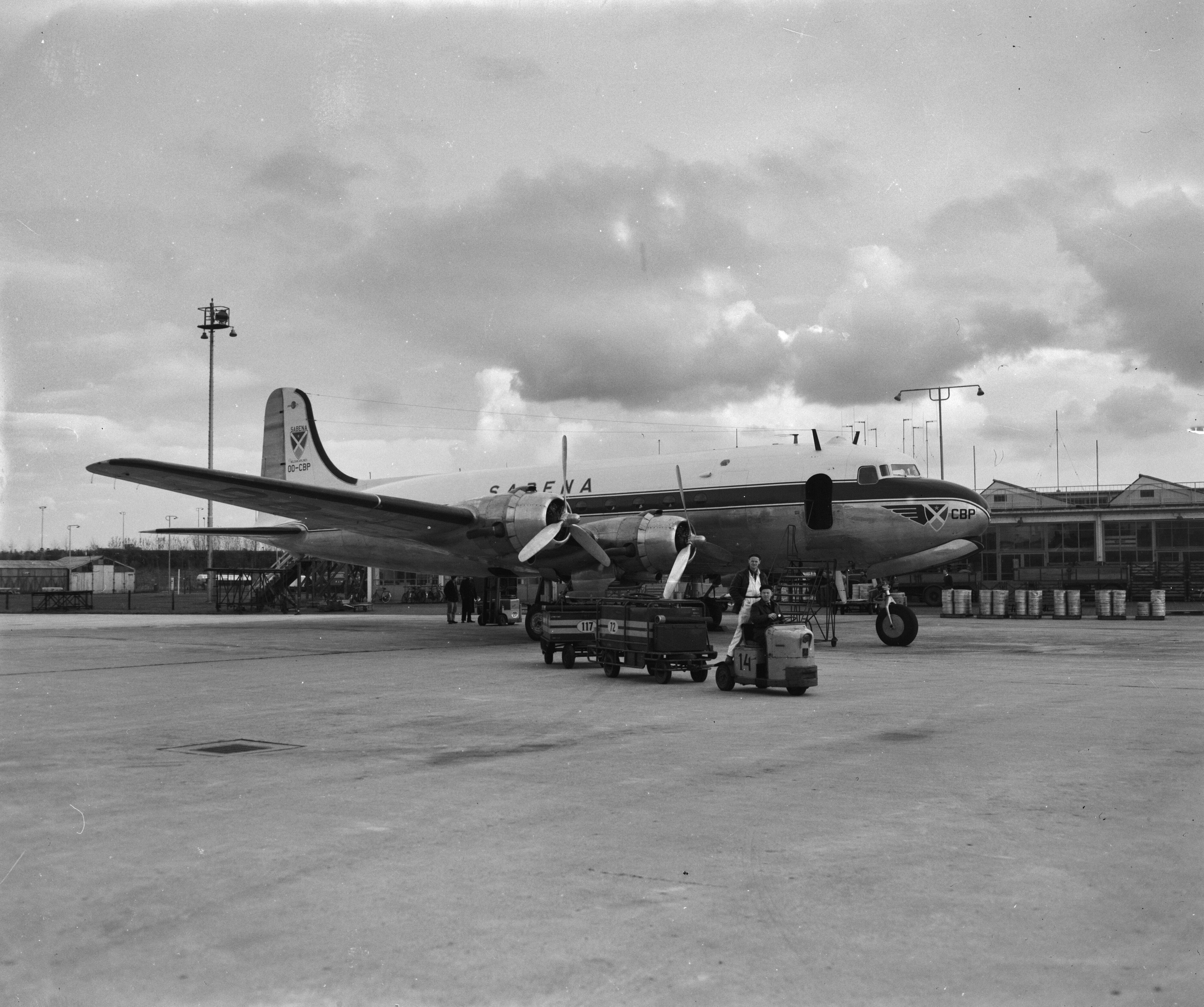 Collectie / Archief : Fotocollectie Anefo Reportage / Serie : [ onbekend ] Beschrijving : Opdrachten vatenfabriek via Sabena Schiphol Datum : 17 november 1954 Locatie : Amsterdam, Noord-Holland Trefwoorden : Opdrachten Instellingsnaam : Sabena Fotograaf : Noske, J.D. / Anefo Auteursrechthebbende : Nationaal Archief Materiaalsoort : Negatief (zwart/wit) Nummer archiefinventaris : bekijk toegang 2.24.01.04 Bestanddeelnummer : 906-8505